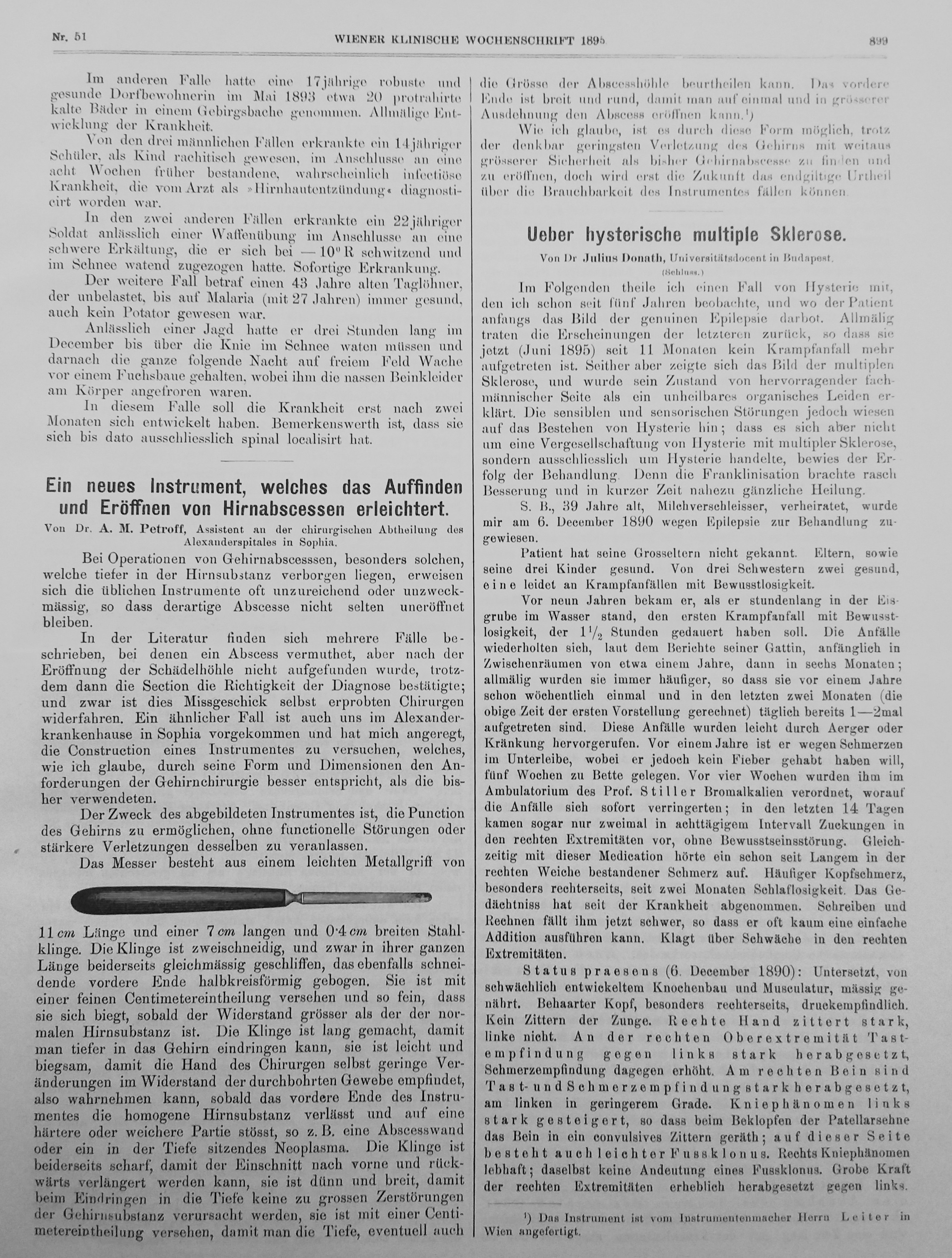 New surgical instrument for brain operations developed by Dr. asen Petrov published in Wiener klinischen Wochenschrift, 1895 51:899. Source: personal archive Marin Gentchev